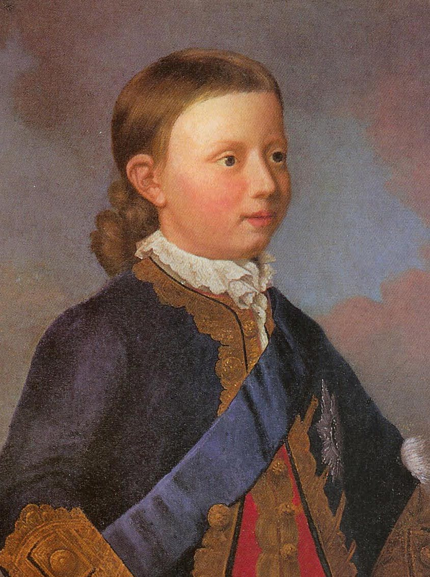 Portret van een jonge stadhouder Willem V (1748-1806)